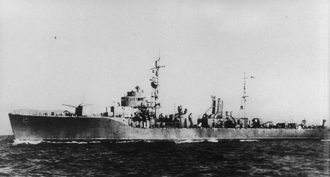 日本海軍 御蔵型海防艦「淡路」、淡路島沖